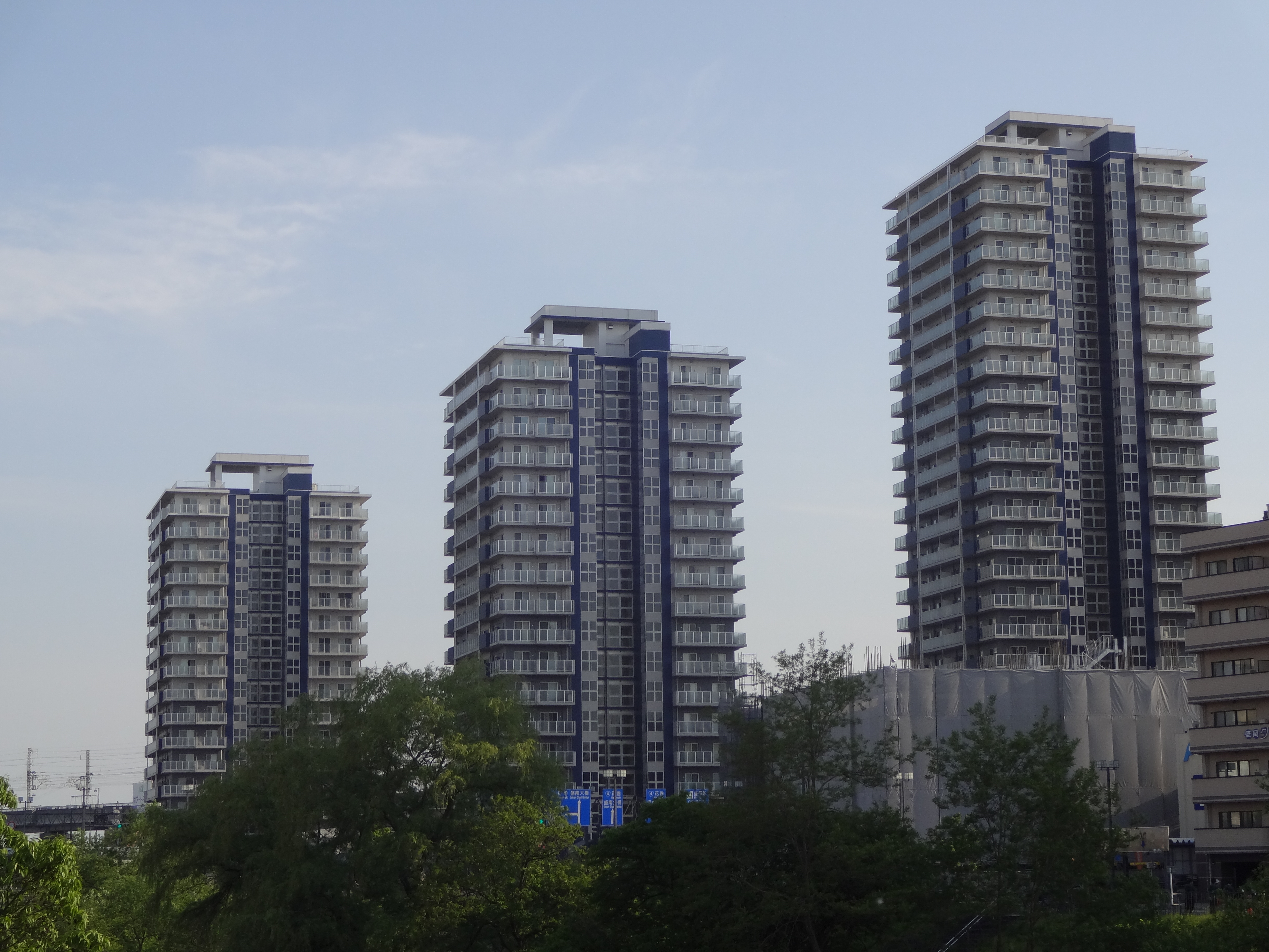 Dグラフォート盛岡駅前タワーズです。 5月26日撮影